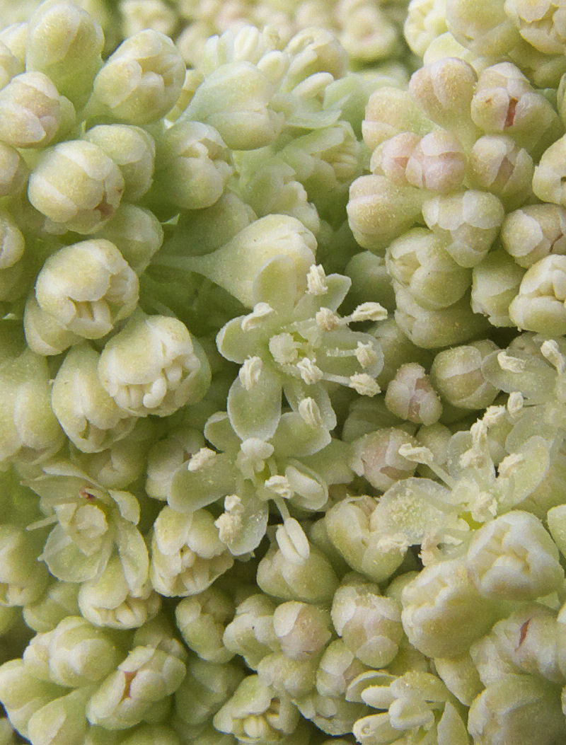 Rabarber (Rheum rhabarbarum) 'Frambozenrood' bloem